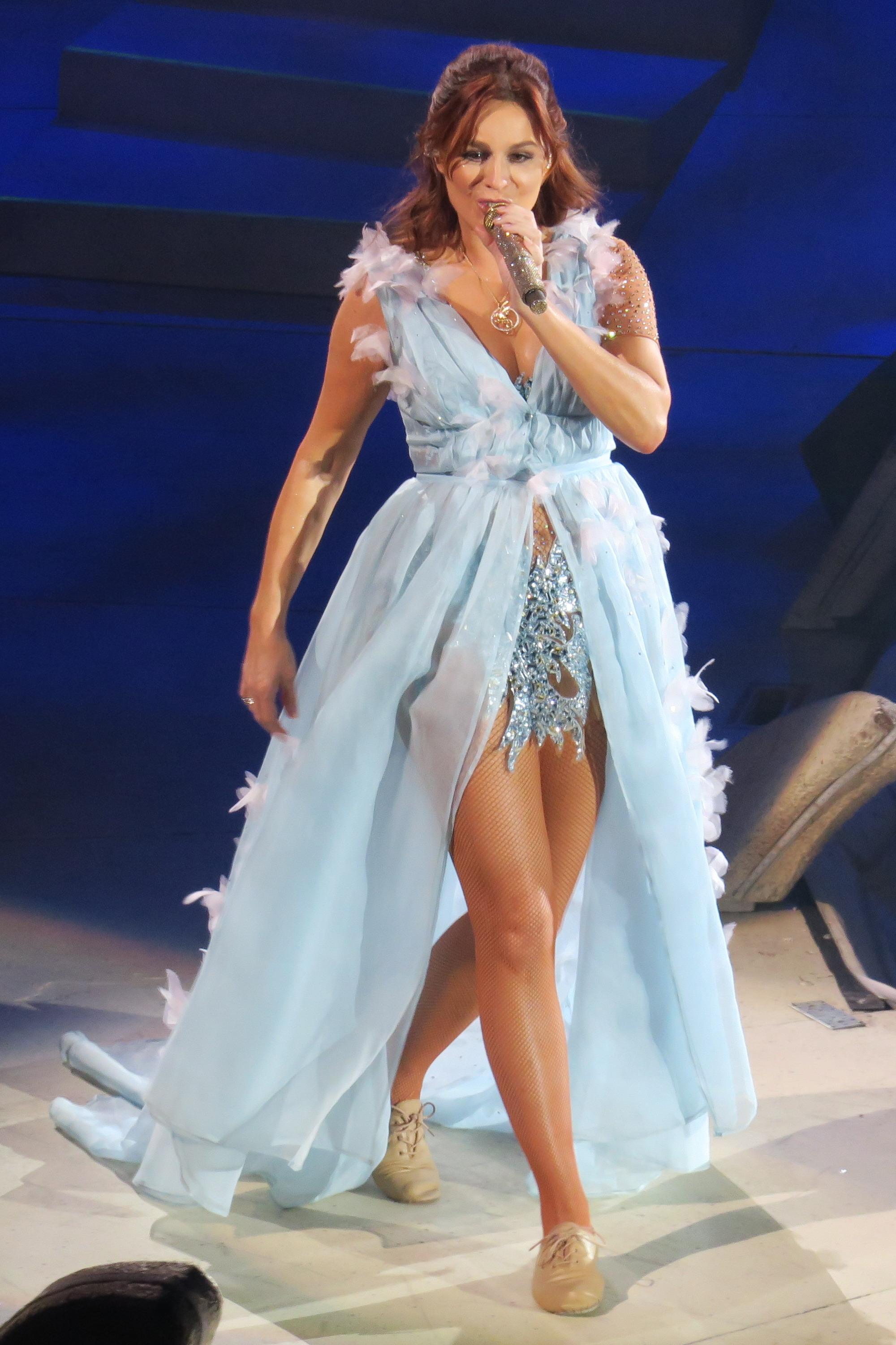 Andrea Berg, Konzert "Seelenbeben", 2017-02-04, Olympiahalle München